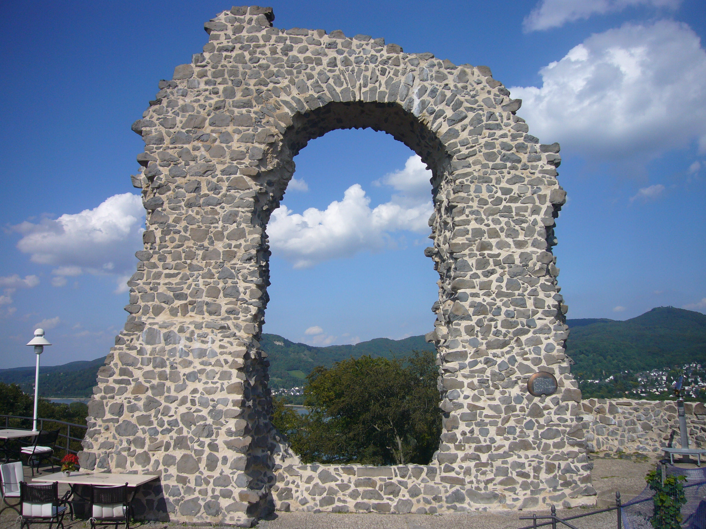 Der Rolandsbogen nach seiner Sanierung und Befreiung von Efeu